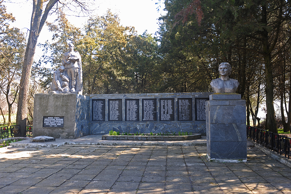 Памятник погибшим односельчанам в селе Охримовка Акимовского района Запорожской области, Украина